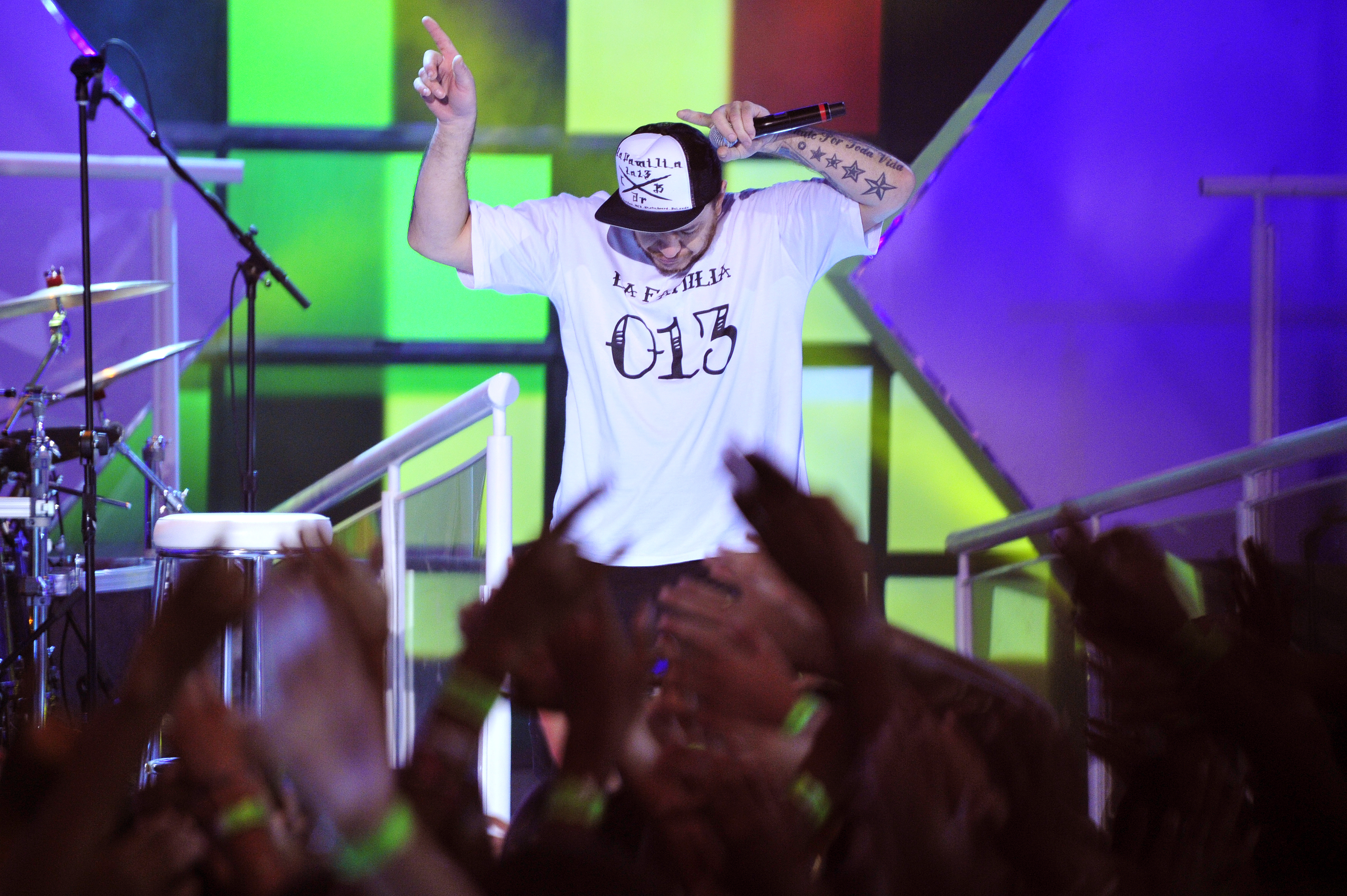 Chorão durante um show.